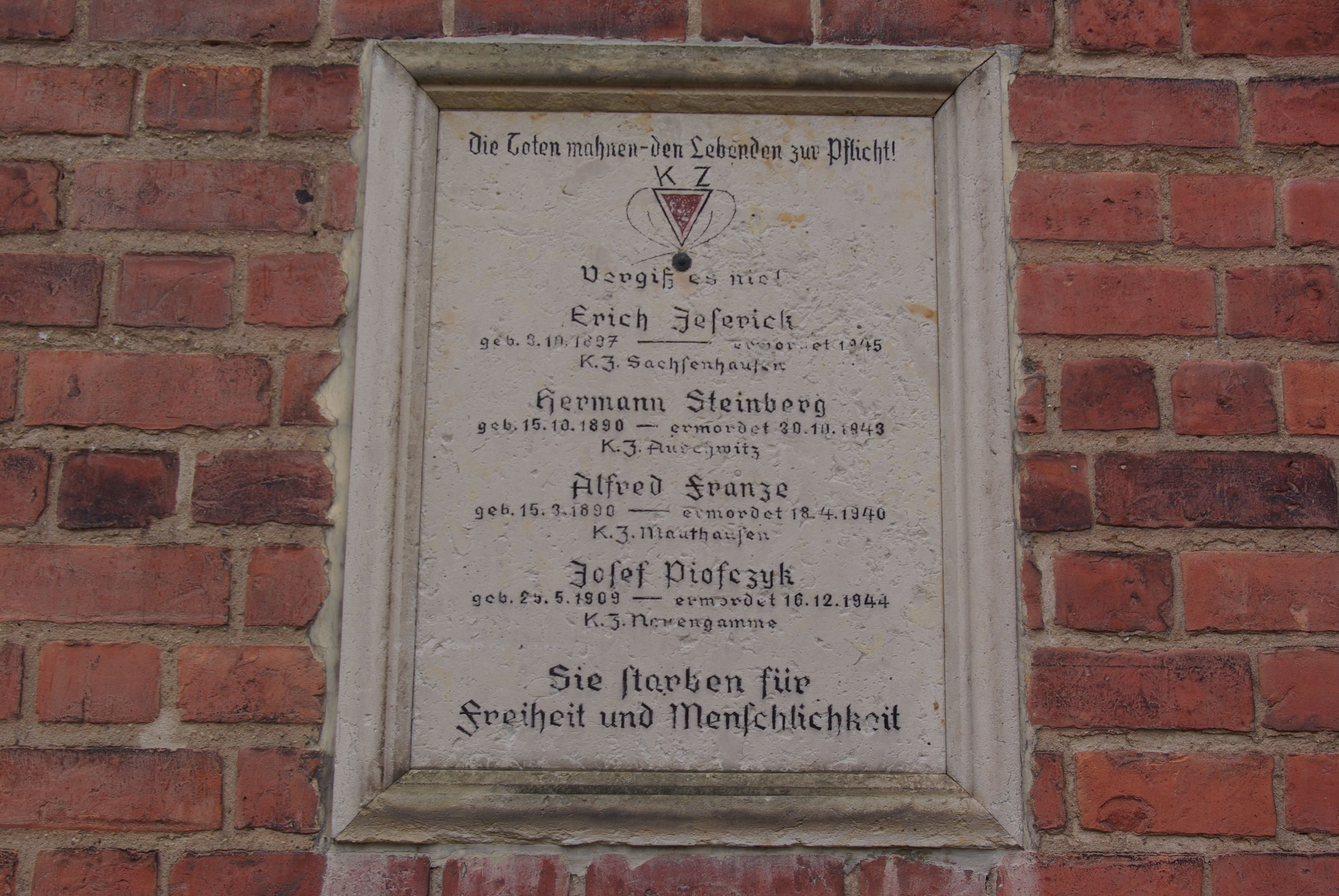 Jüterbog in Brandenburg. Die Tafel am Rathaus soll an Tode in den KZ gedenken. Die Tafel steht unter Denkmalschutz.